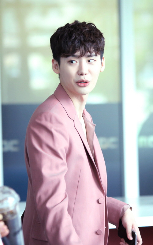 160718 한효주 이종석 W 제작발표회